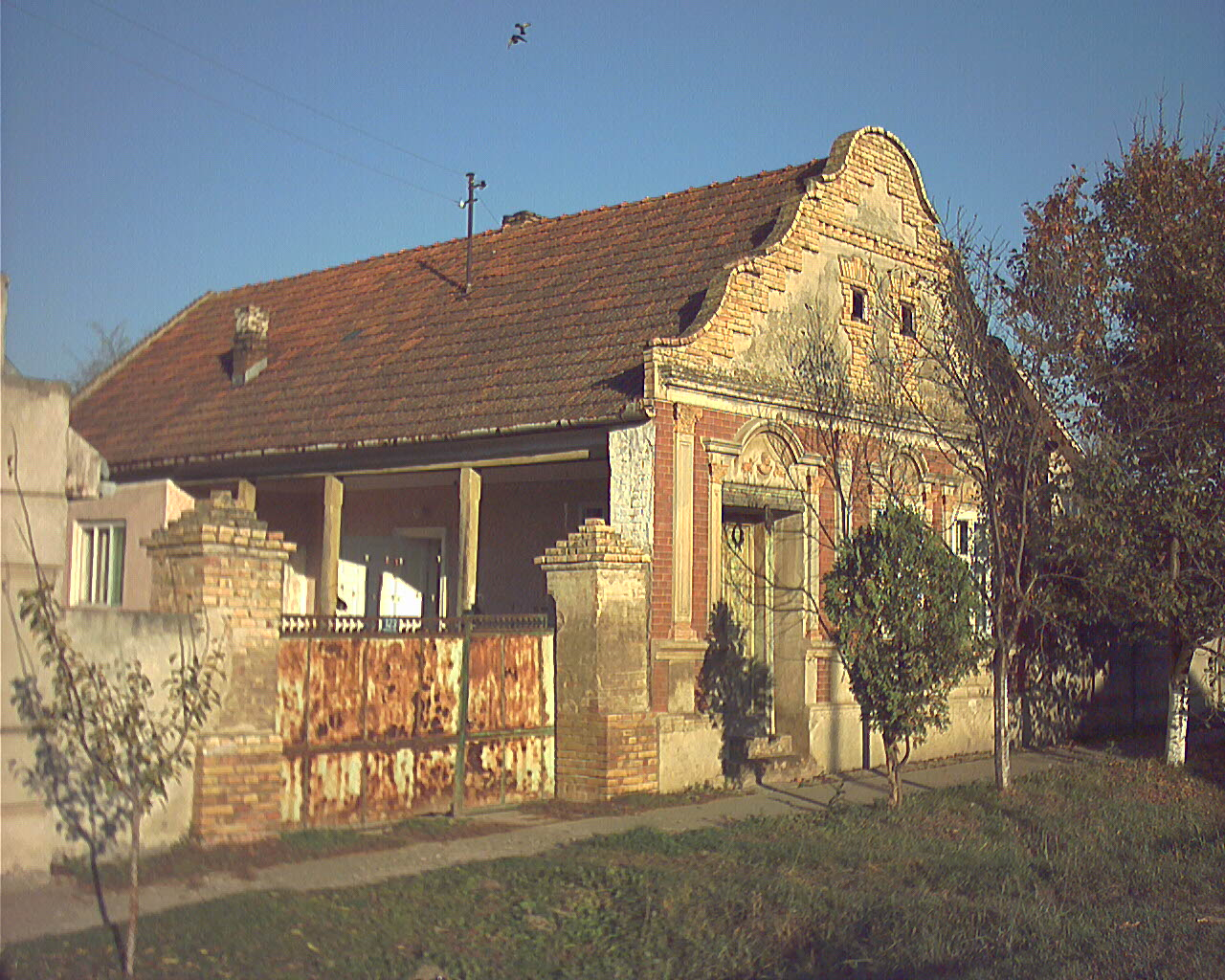 Војвођанска кућа са утицајима барока и сецесије.